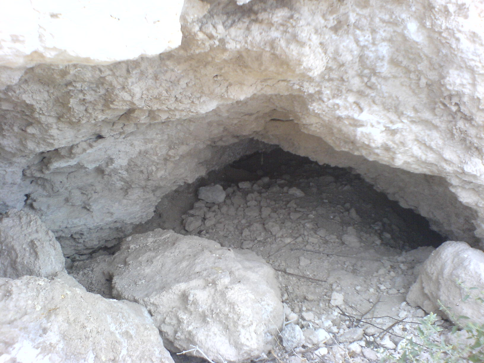 Madriguera